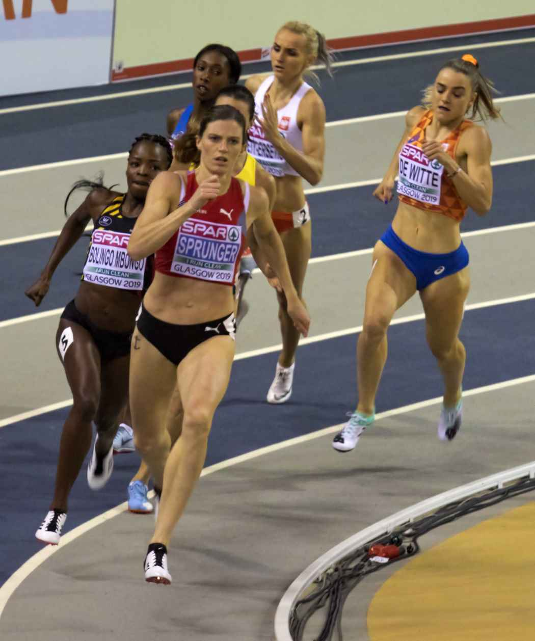 EKI20478 finale 400m dames bolingo sprunger